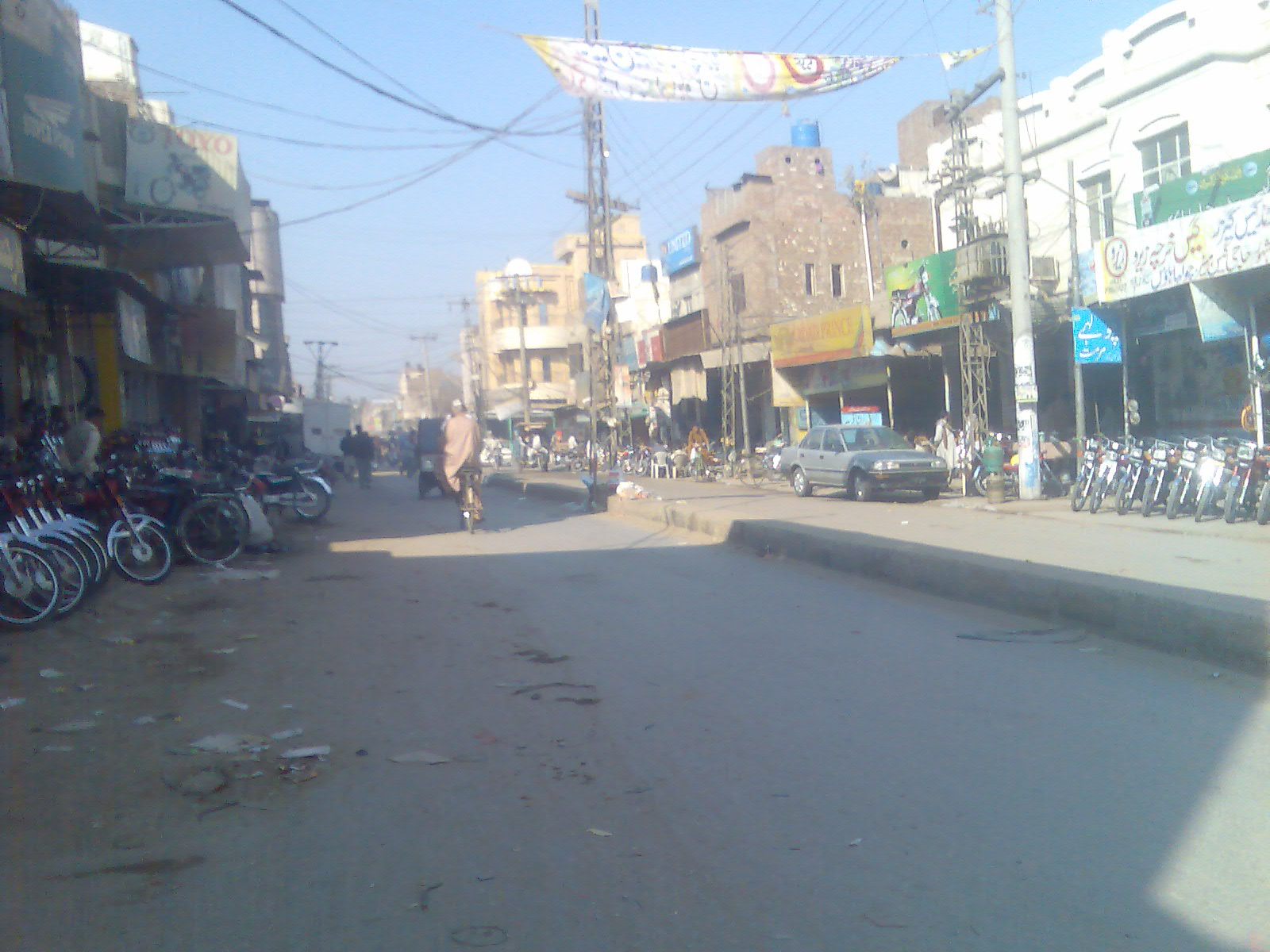 near sarwar chock